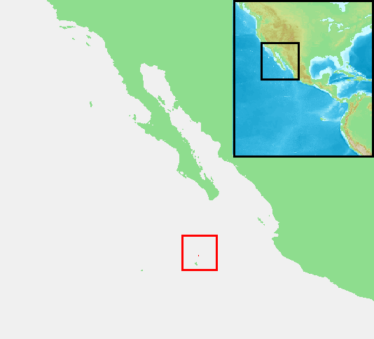 Revillagigedo Islands